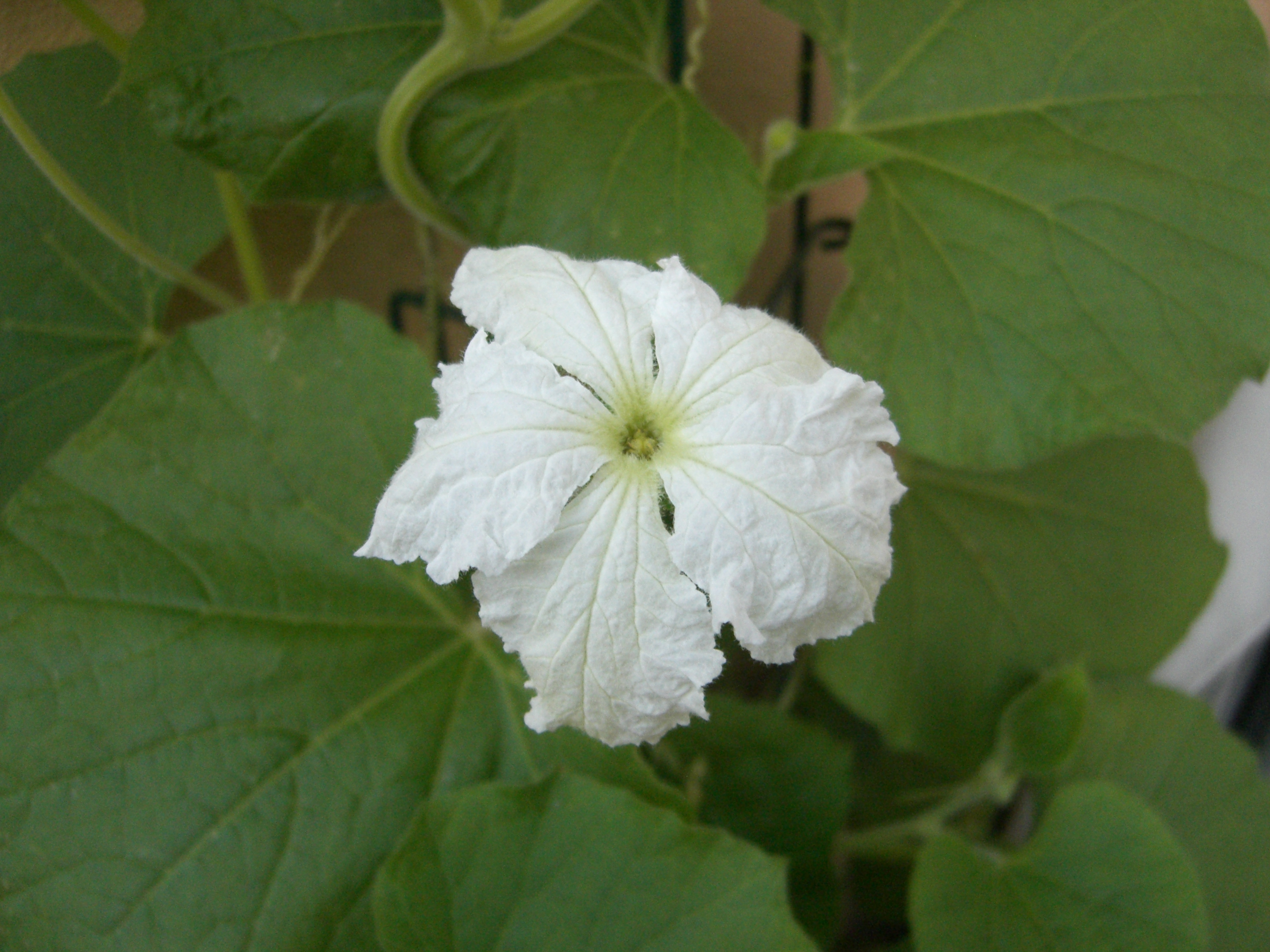 Flaschenkürbisbüte (Lagenaria siceraria)